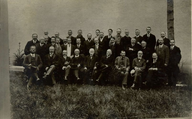 Narodni svet SHS v Zagrebu